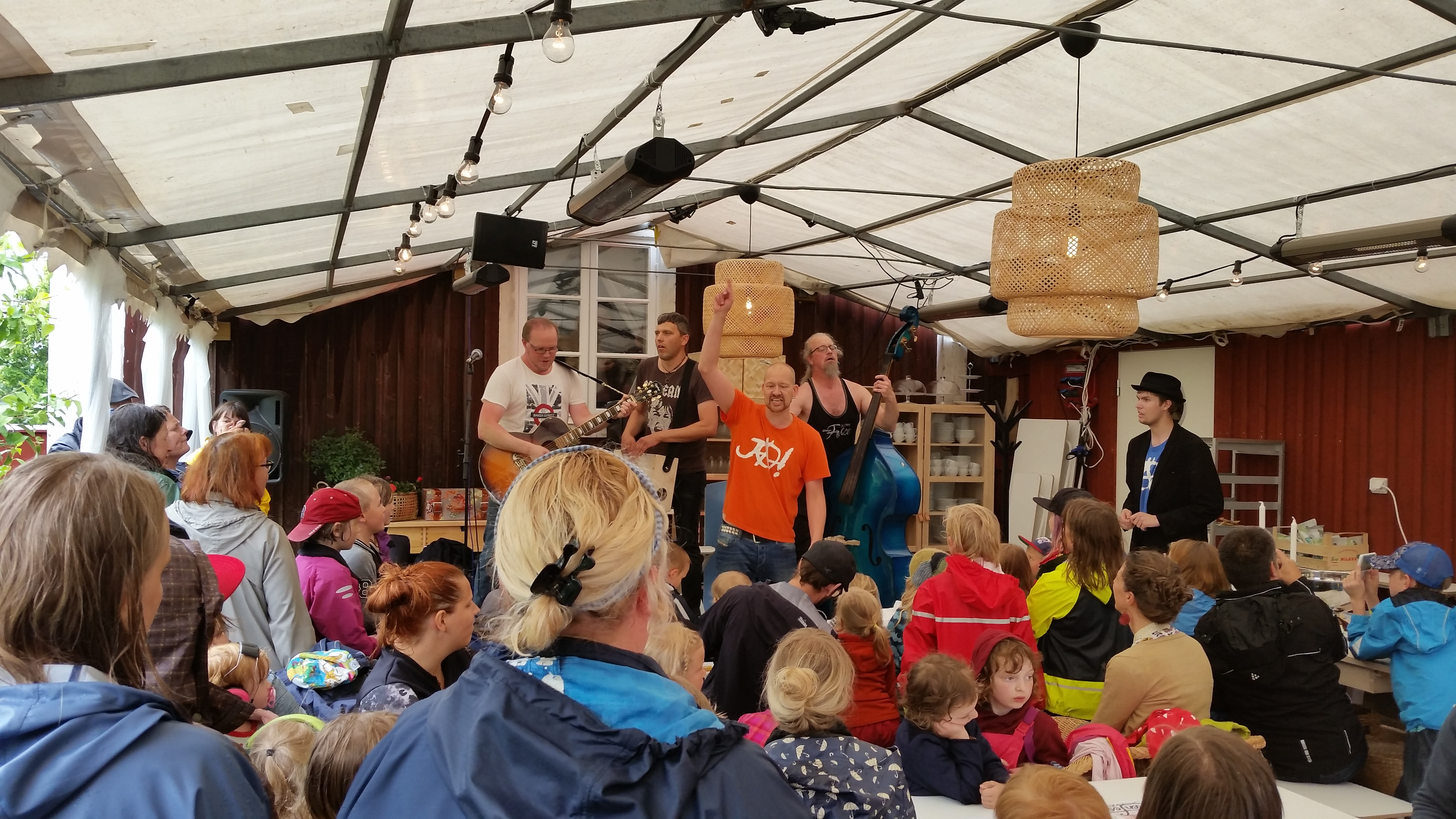 Gruppen "Vi heter JA!" deltar i en gratisfestival